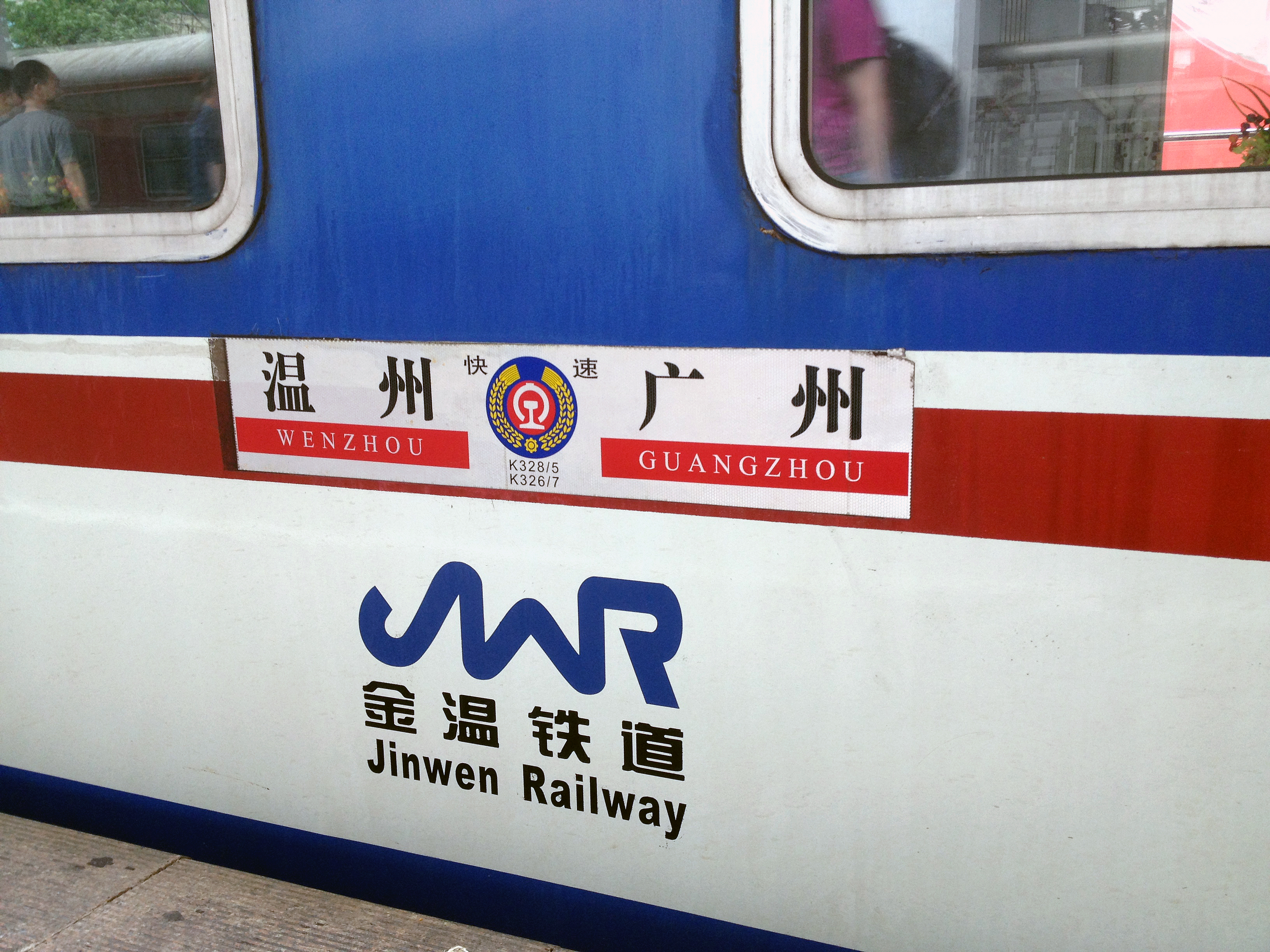 温州-广州K326/327、K328/325次列车水牌